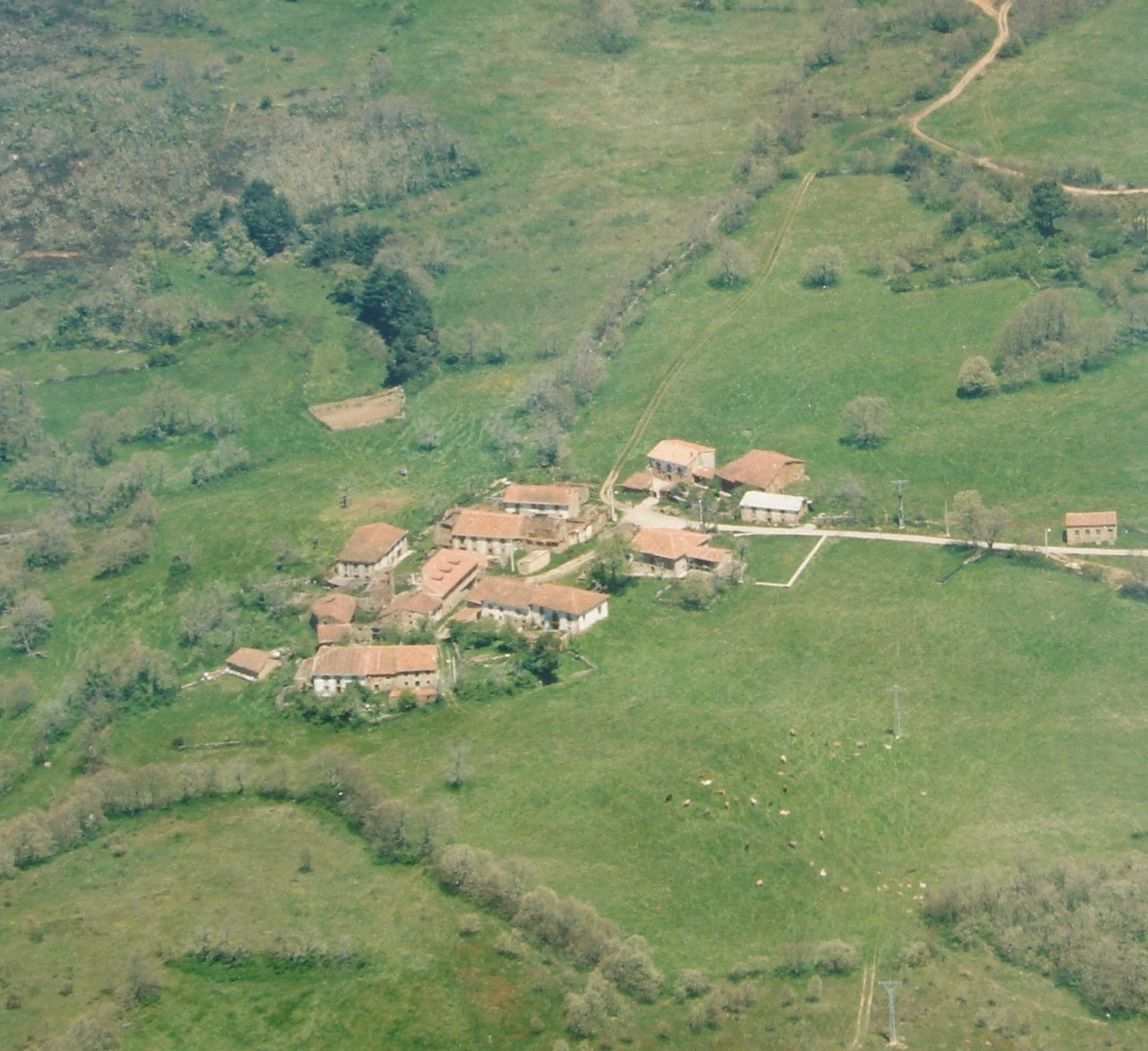 Vista aérea de Otero del Monte